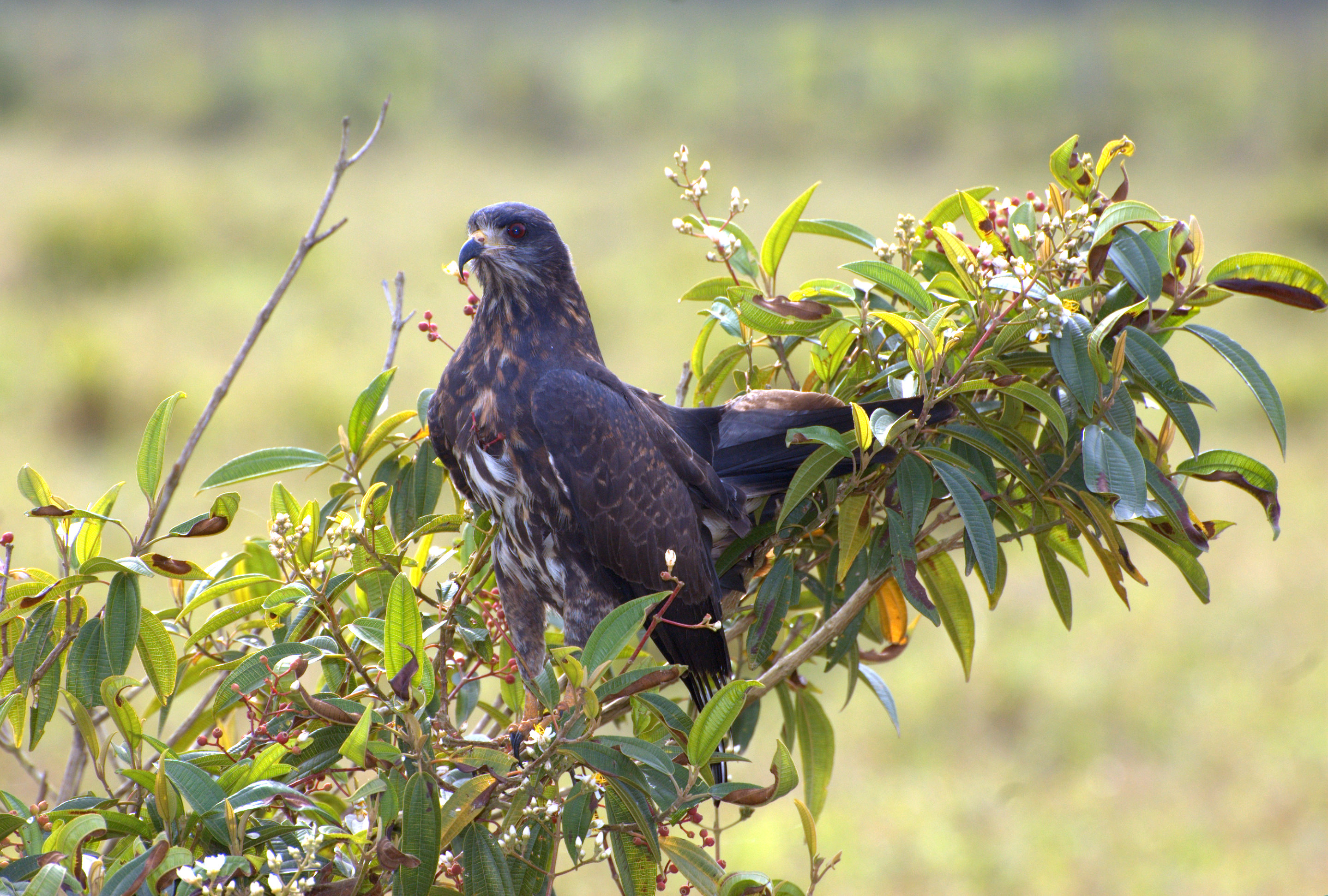 Vale do Ribeira - Registro-SP - Brasil